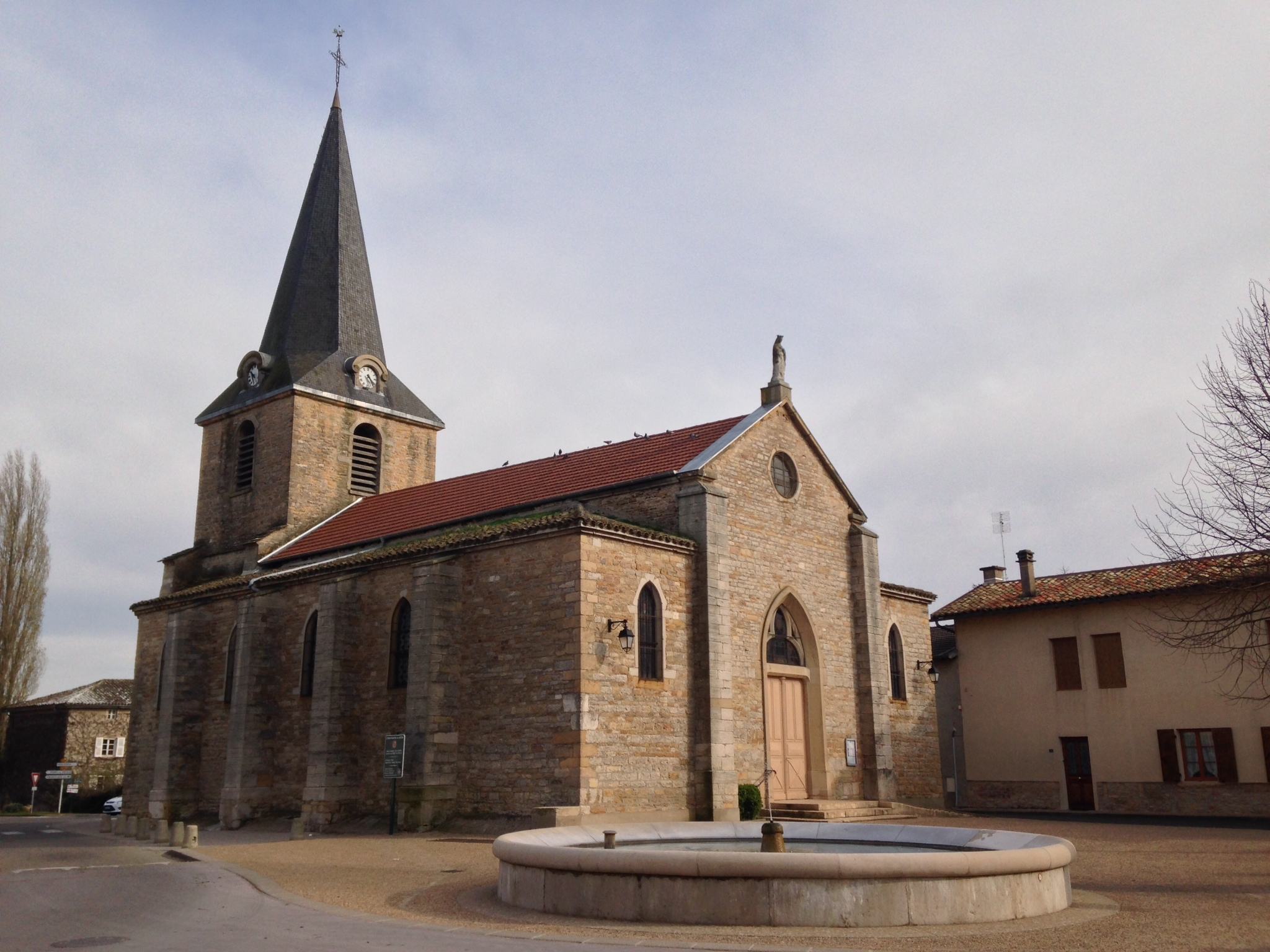 Église du village de Cormoranche-sur-Saône